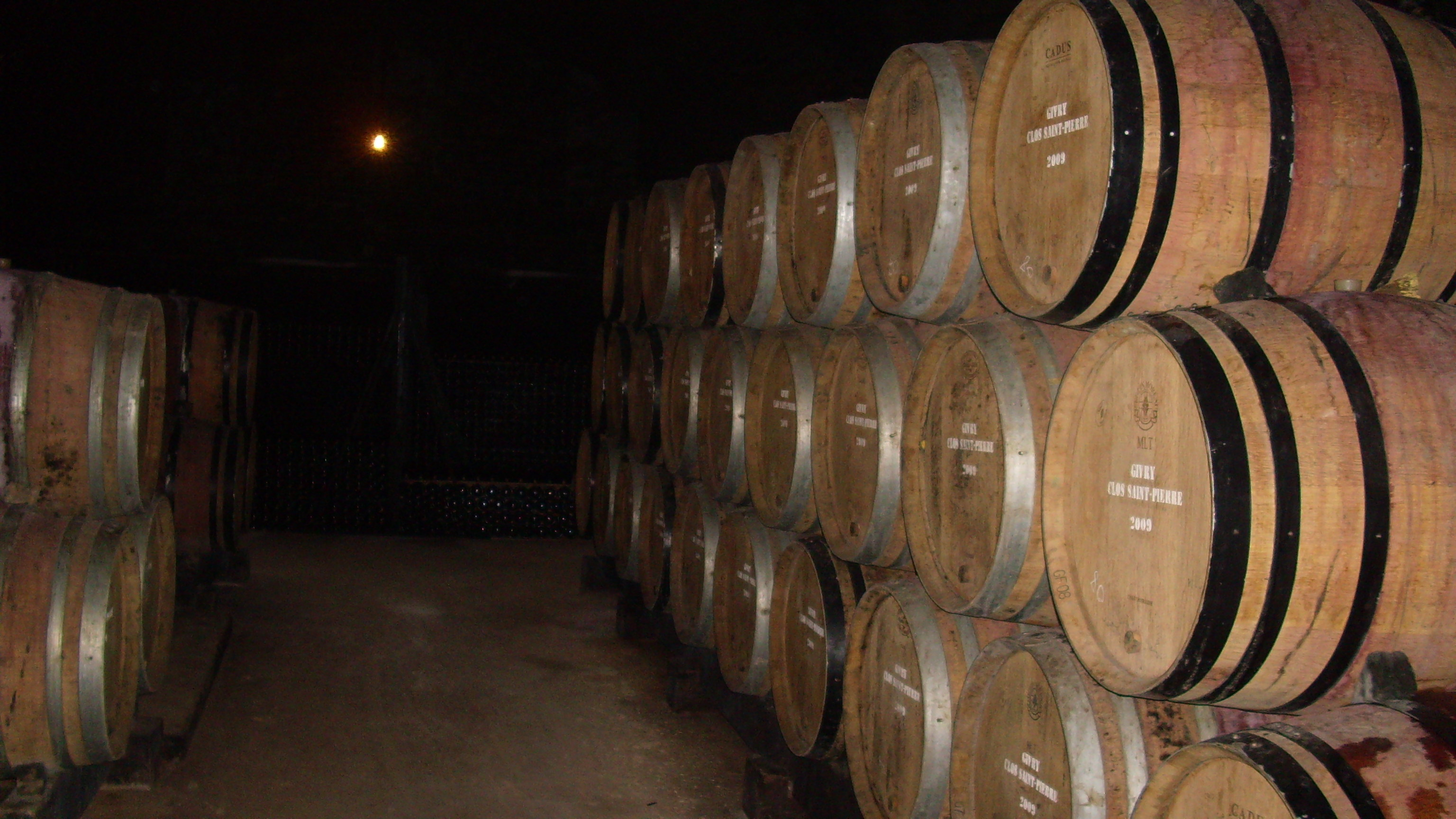 Futs de vin dans une cave de Givry (sâone-et-Loire)